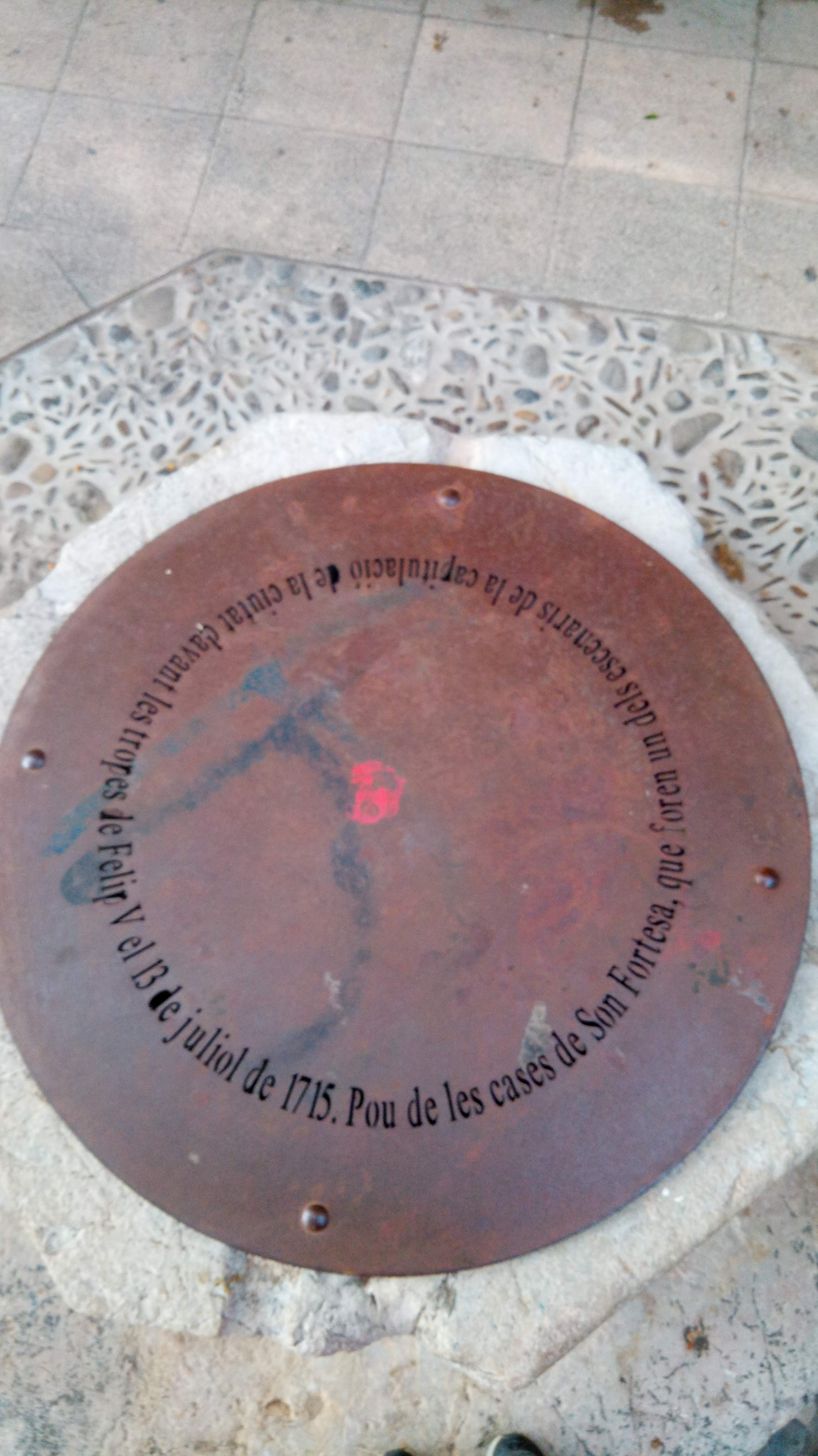 Pou de les antigues cases de Son Fortesa, esbucades el 1994. La inscripció diu: «Pou de les cases de Son Fortesa, que foren un dels escenaris de la capitulació de la ciutat davant les tropes de Felip V el 13 de juliol de 1715.»